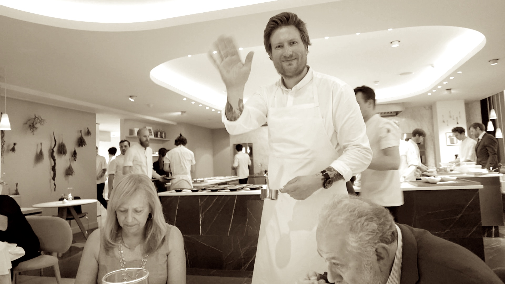 OAD Masters Dinners, Geranium, Copenhagen, Denmark 05/21/16